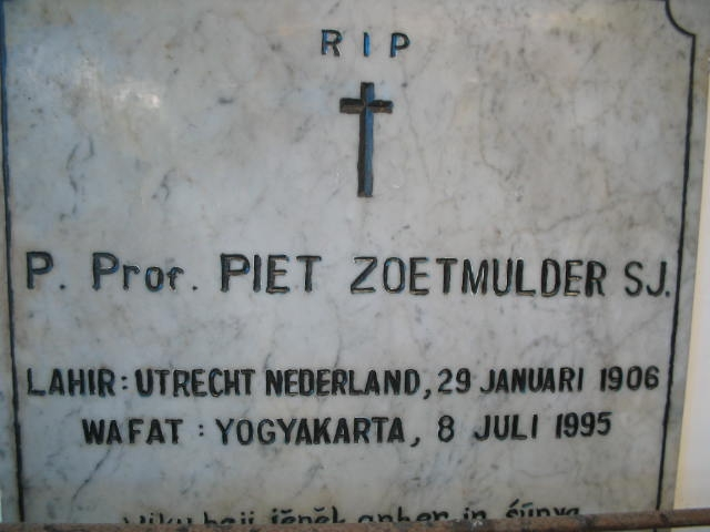 Gemaakt door mijn partner (Petrus Wijayanto) en met zijn toestemming in PD geplaatst. Bessel Dekker 18 mei 2006 10:55 (CEST)